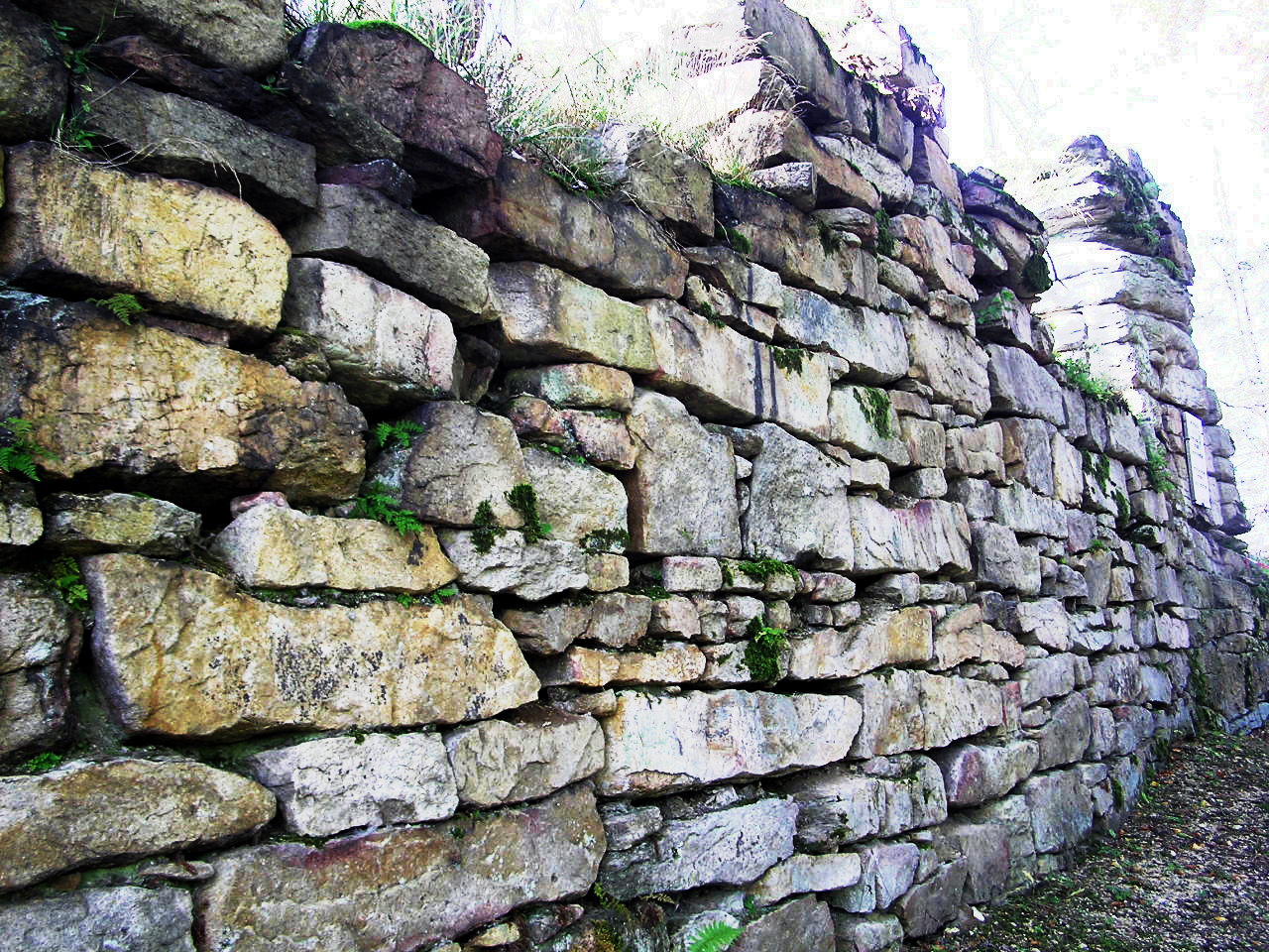 Description: Ruine Hirschstein am Großen Kornberg Source: selbst fotografiert Date: 7. Oktober 2005 Author: Schubbay